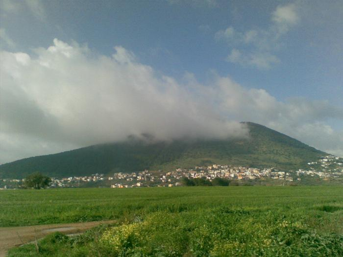 הר תבור מכוסה בעננים